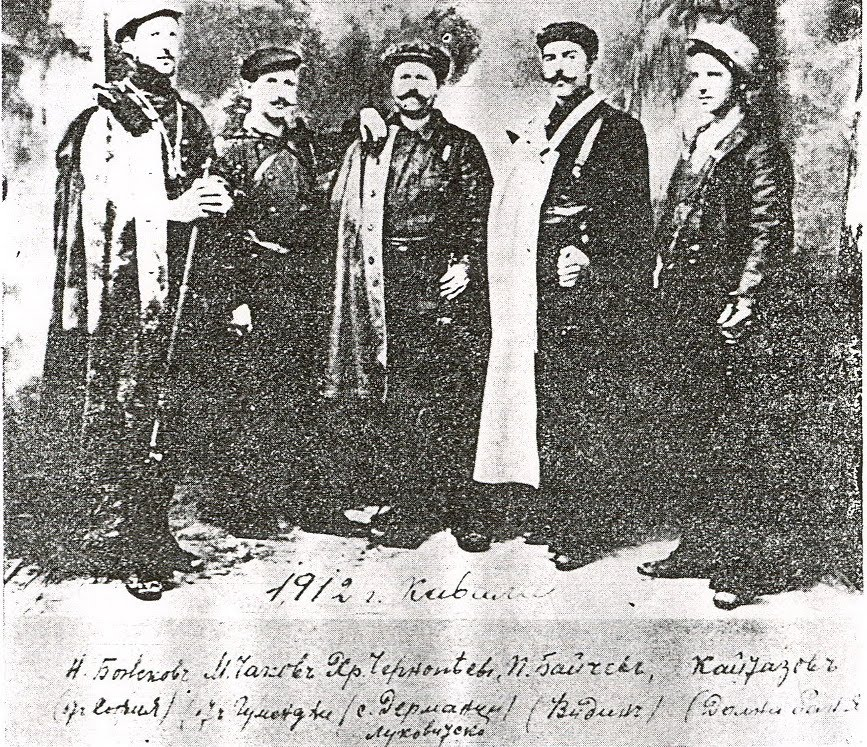 Никола Божков, Михаил Чаков, Христо Чернопеев, Панайот Байчев, Ангел Кайтазо в освободения Кавала, 1912.